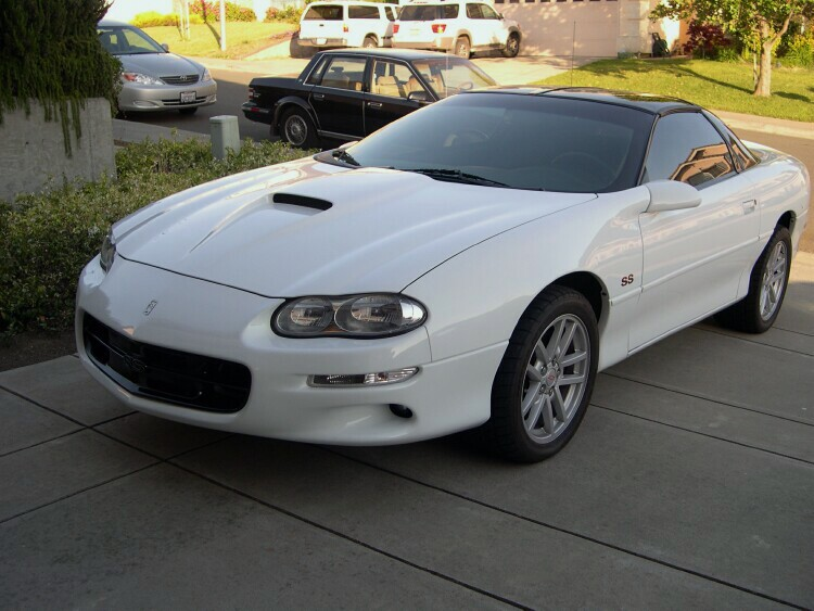 A 2001 Camaro SS